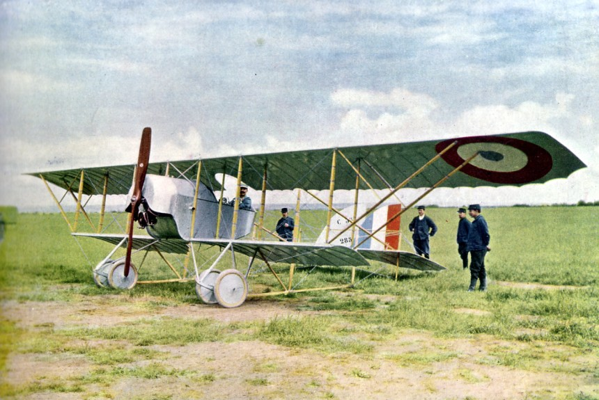 Autochrome de Gervais-Courtellemont publié dans Les Champs de Bataille de la Marne sous le titre : Un_avion_de_guerre et la_journée_9_sept_14 venant de la bibliothèque de Reims sous la référence : RG_38,_n°8_p113.